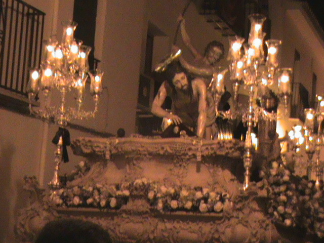 Cristo del Mayor Dolor, Antequera.